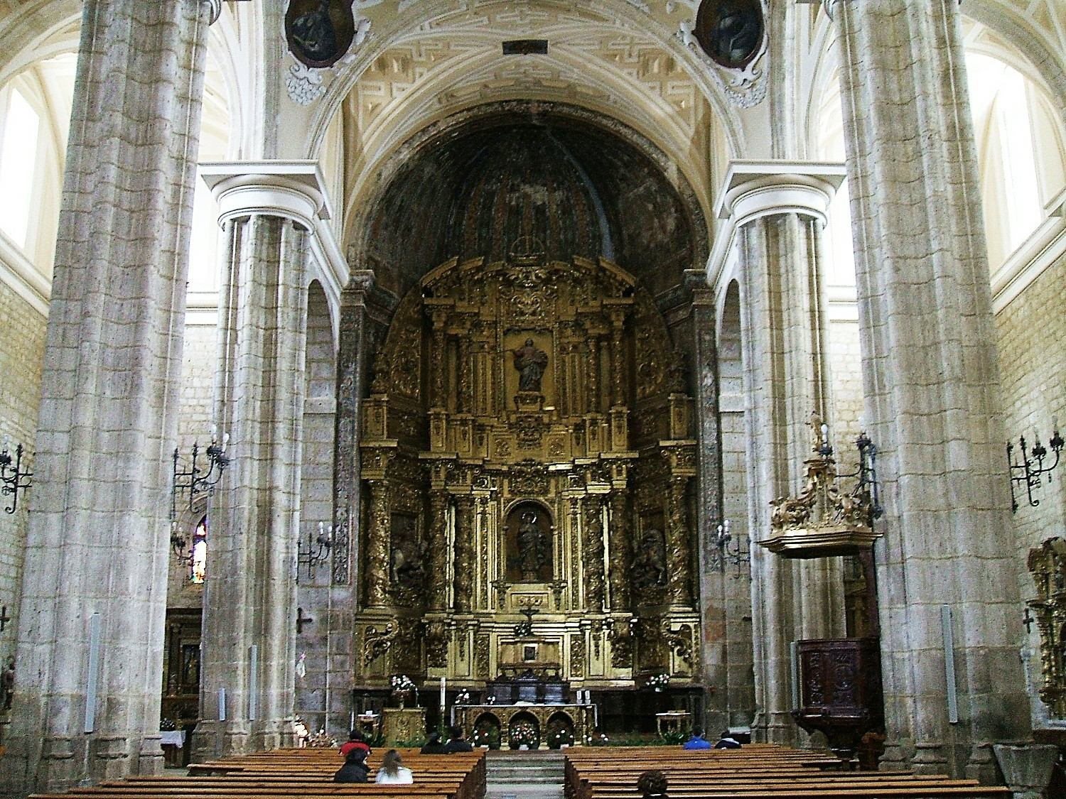 Iglesia de Santa Eugenia (s-XVI y XVII), Becerril de Campos, Palencia, España/Spain